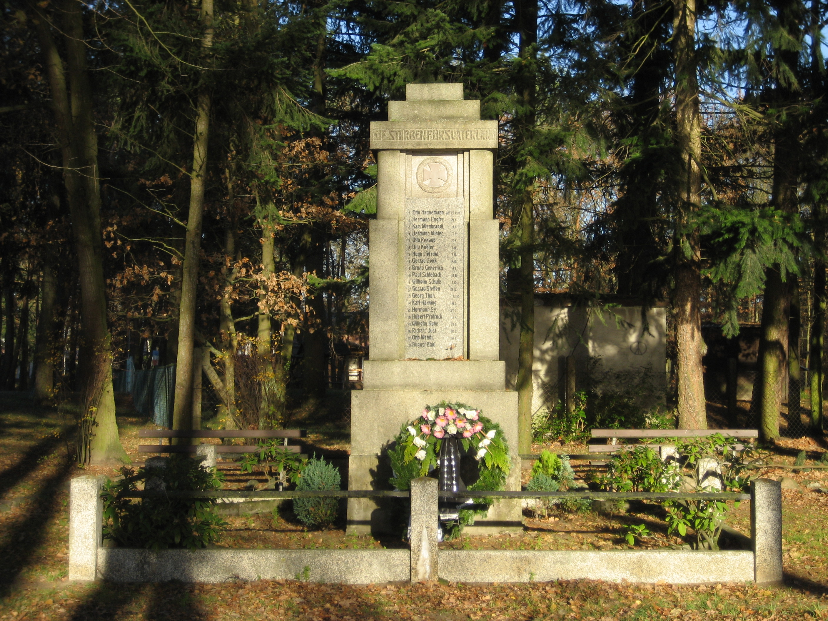 Kriegerdenkmal für die im Ersten Weltkrieg gefallenen 79 Soldaten aus Löcknitz am Löcknitzer See, Vorderseite aus Blickrichtung Süden vom See aus.